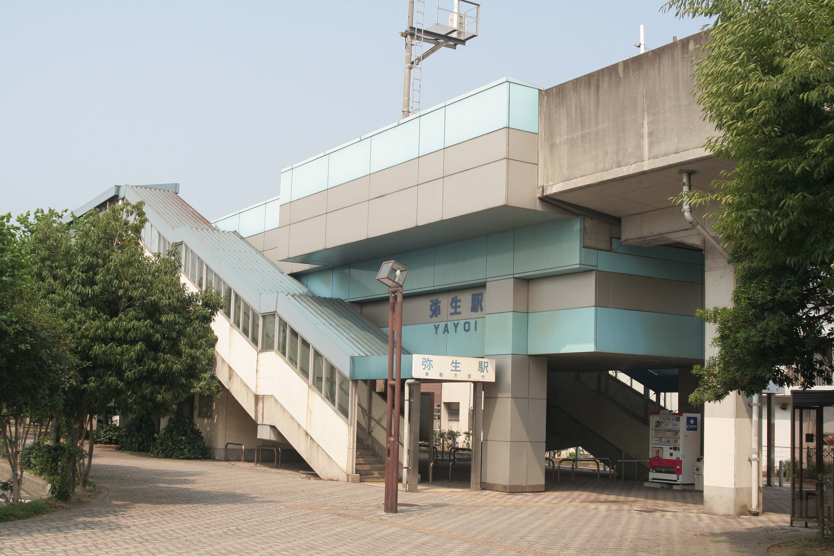 水島臨海鉄道、弥生駅の駅舎